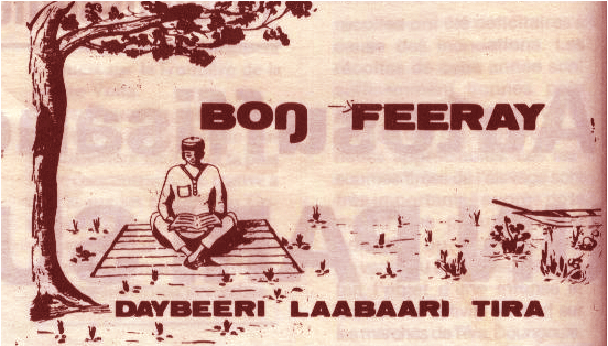 Tête d'un jounal rural en langue Zarma Auteur : Utilisateur:Taway